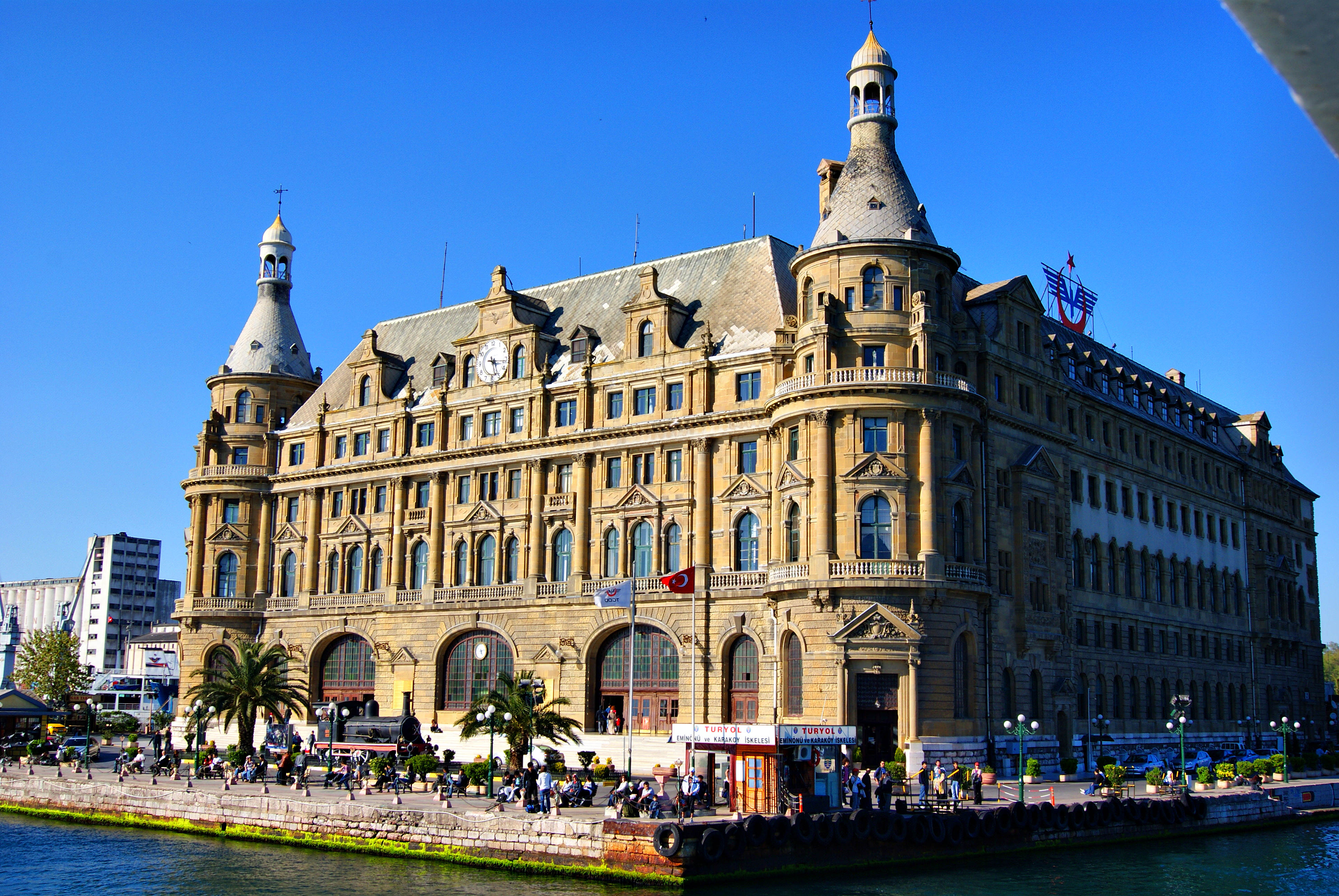 Rasimpaşa, Haydarpaşa İskelesi, Haydarpaşa Gar Binası Yanı, 34716 Kadıköy/İstanbul, Turkey